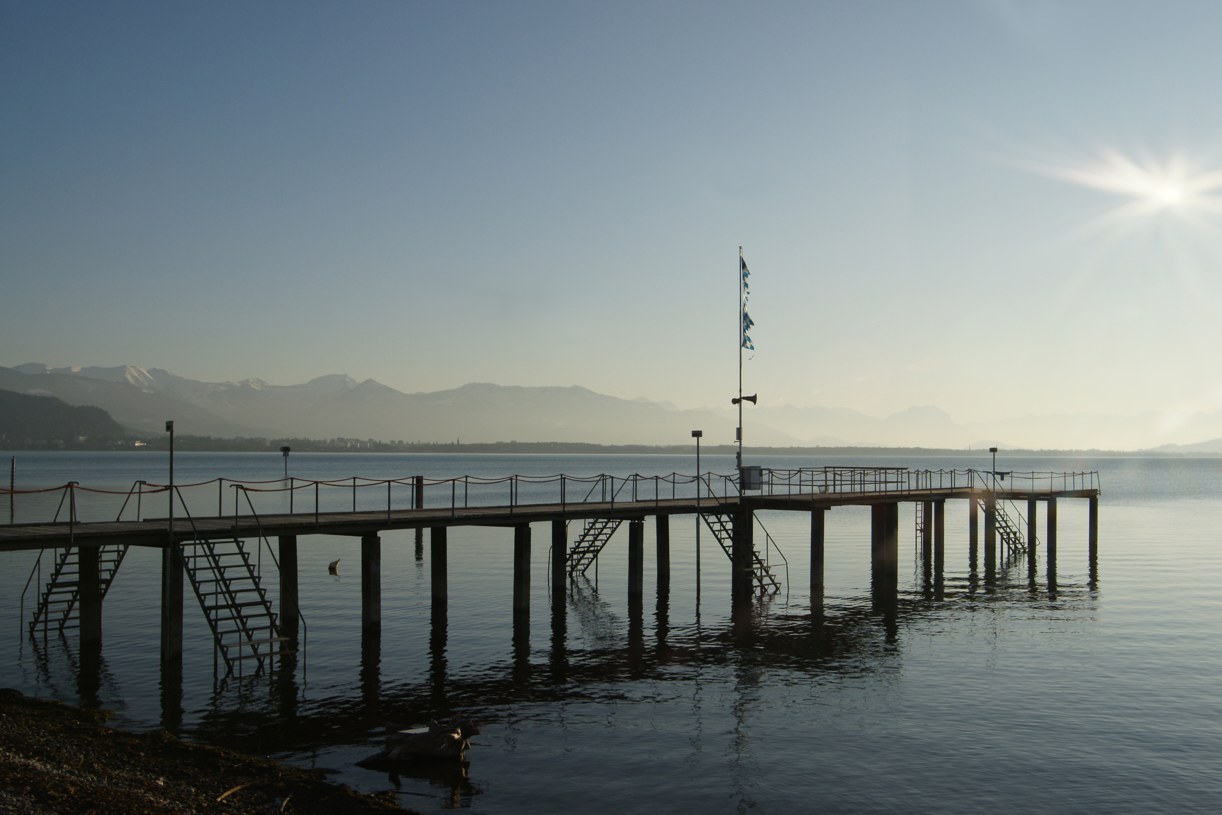 Steg am Strandbad von Lindau am Bodensee. Am Bildrand mit Schnee bedeckt das Bregenzerwaldgebirge mit der Dornbirner Firstkette und dem Karrenberg.